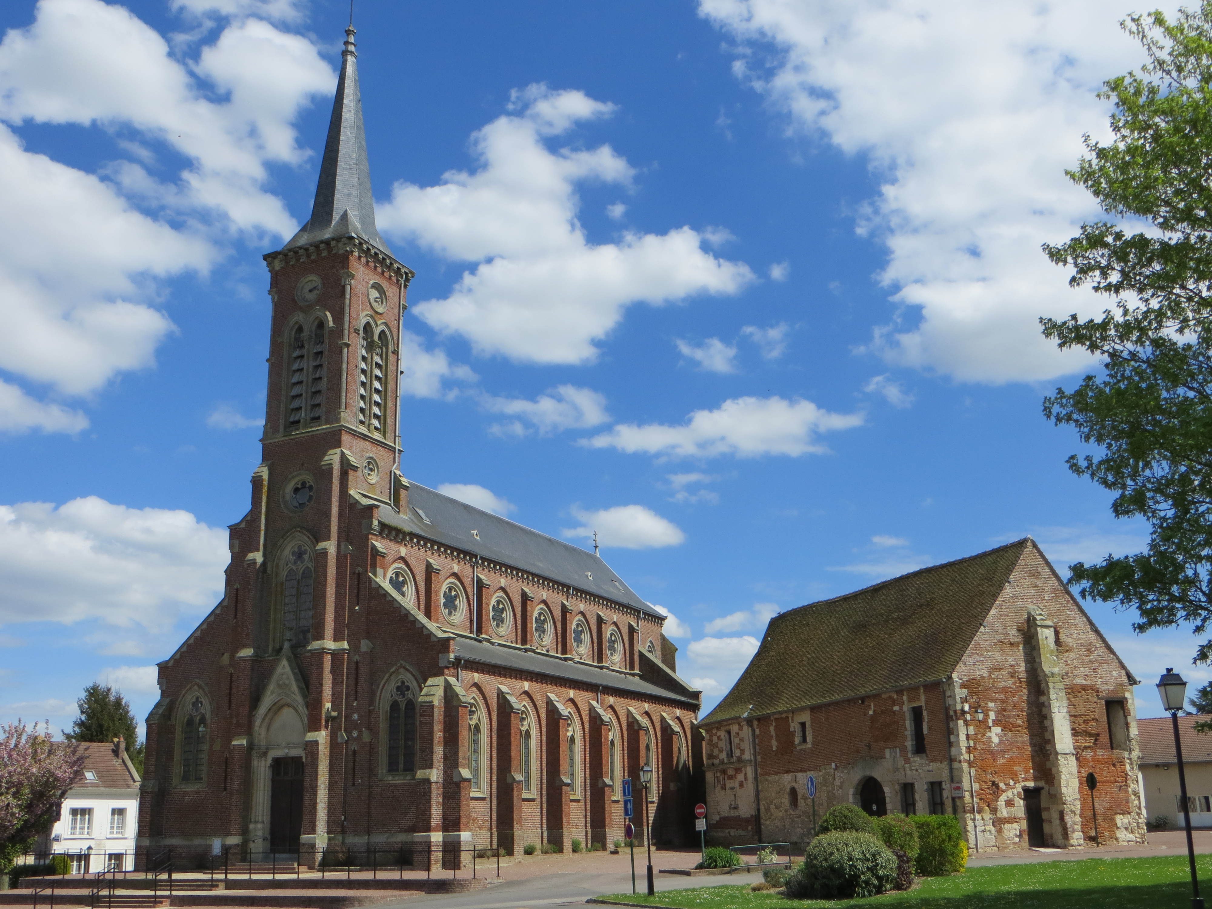 Vue de l'église et de la façade du logis seigneurial